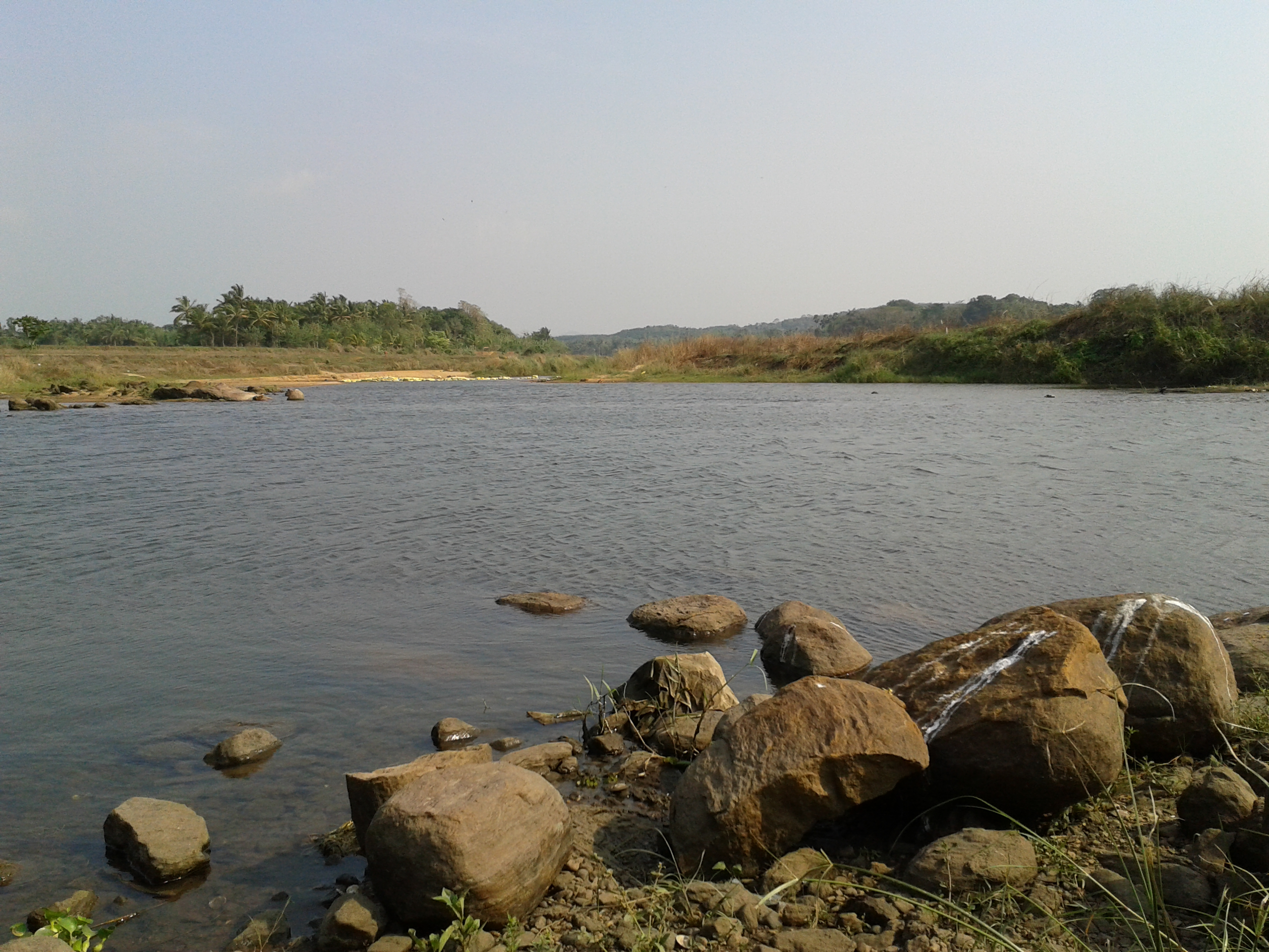 കാരക്കാട് നിന്നുള്ള ഭാരതപ്പുഴയുടെ ദൃശ്യം